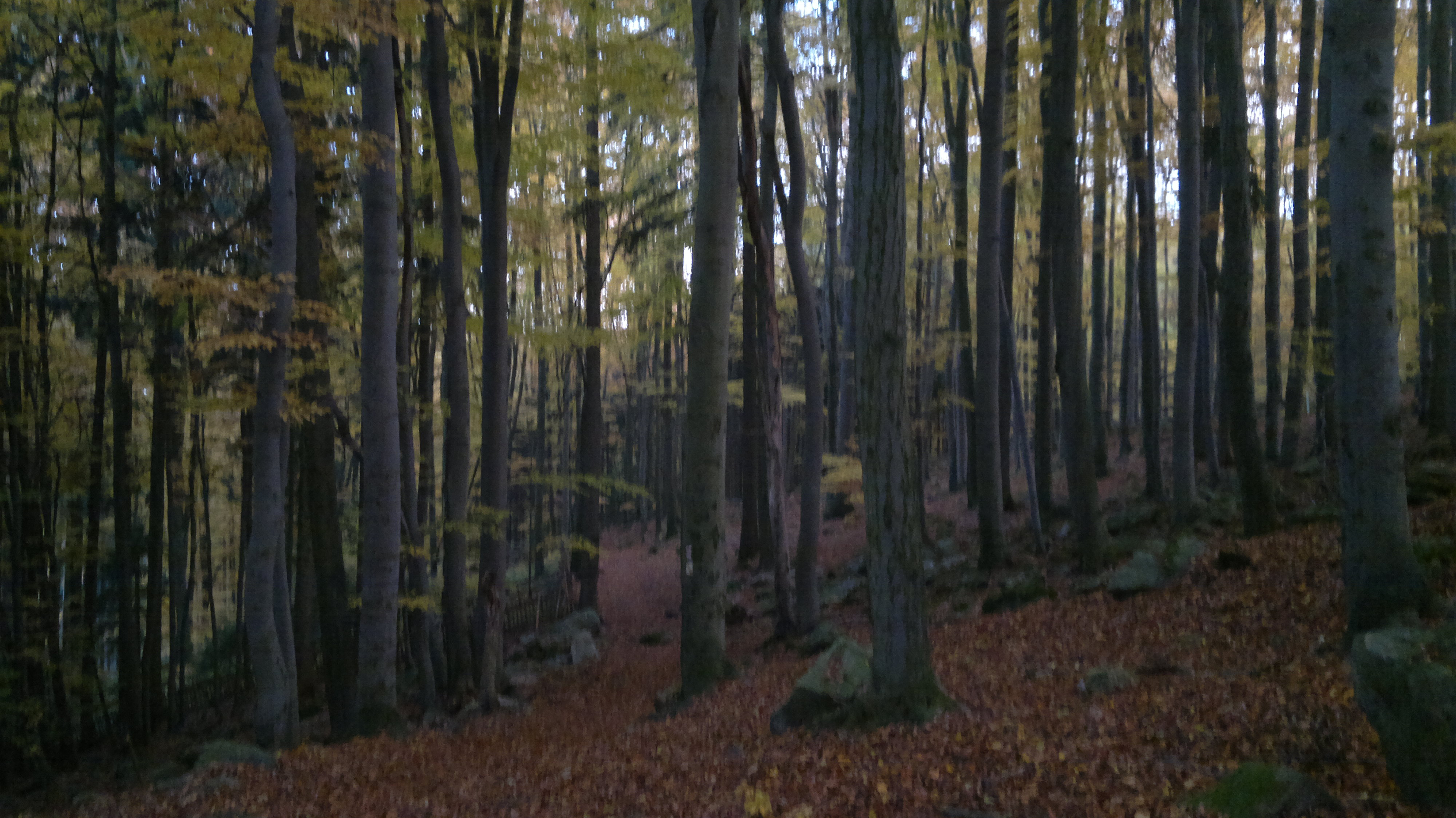 Původní kyselá bučina vrcholových partií Malého Blaníku